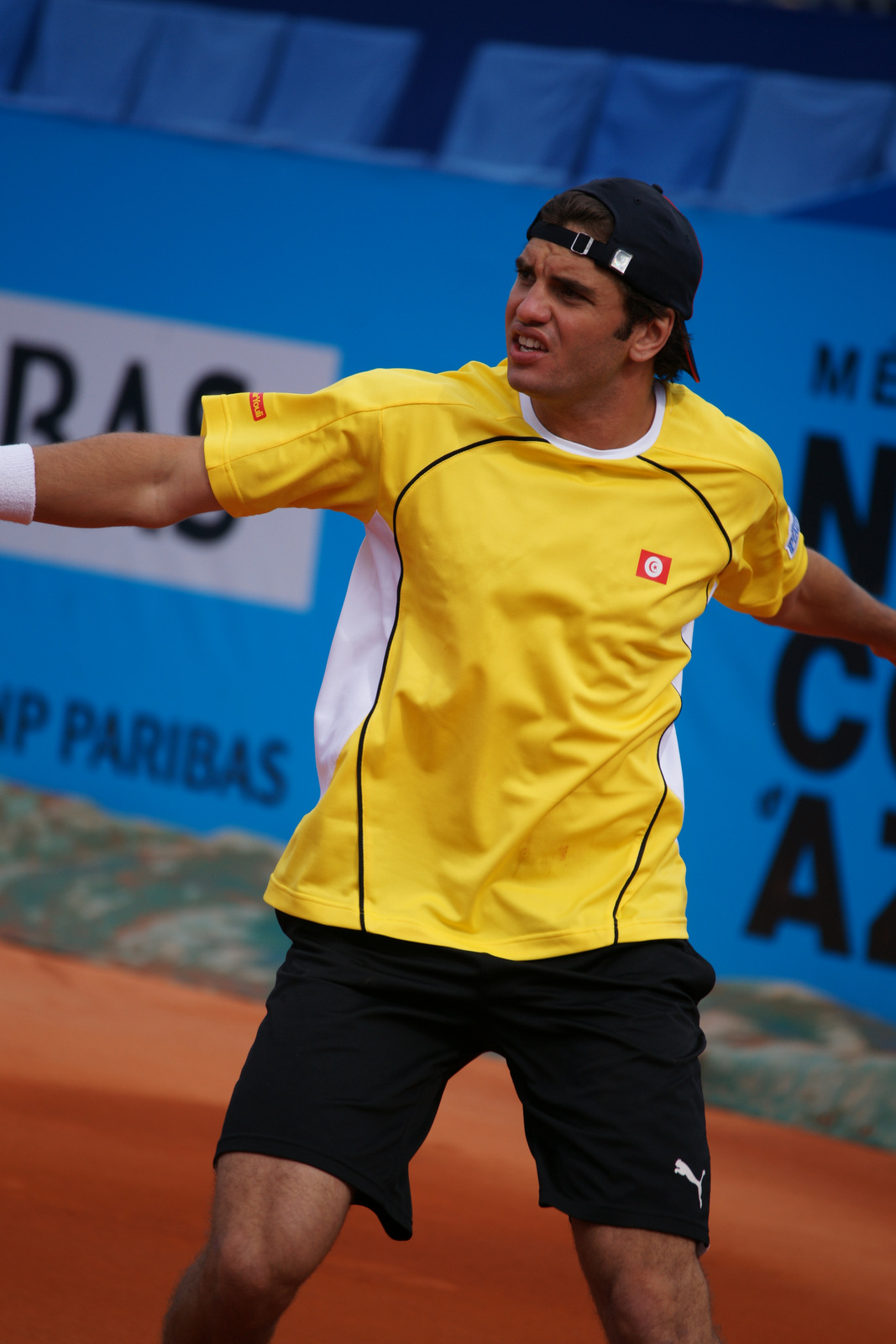 Malek Jaziri, Open tennis Nice 2012